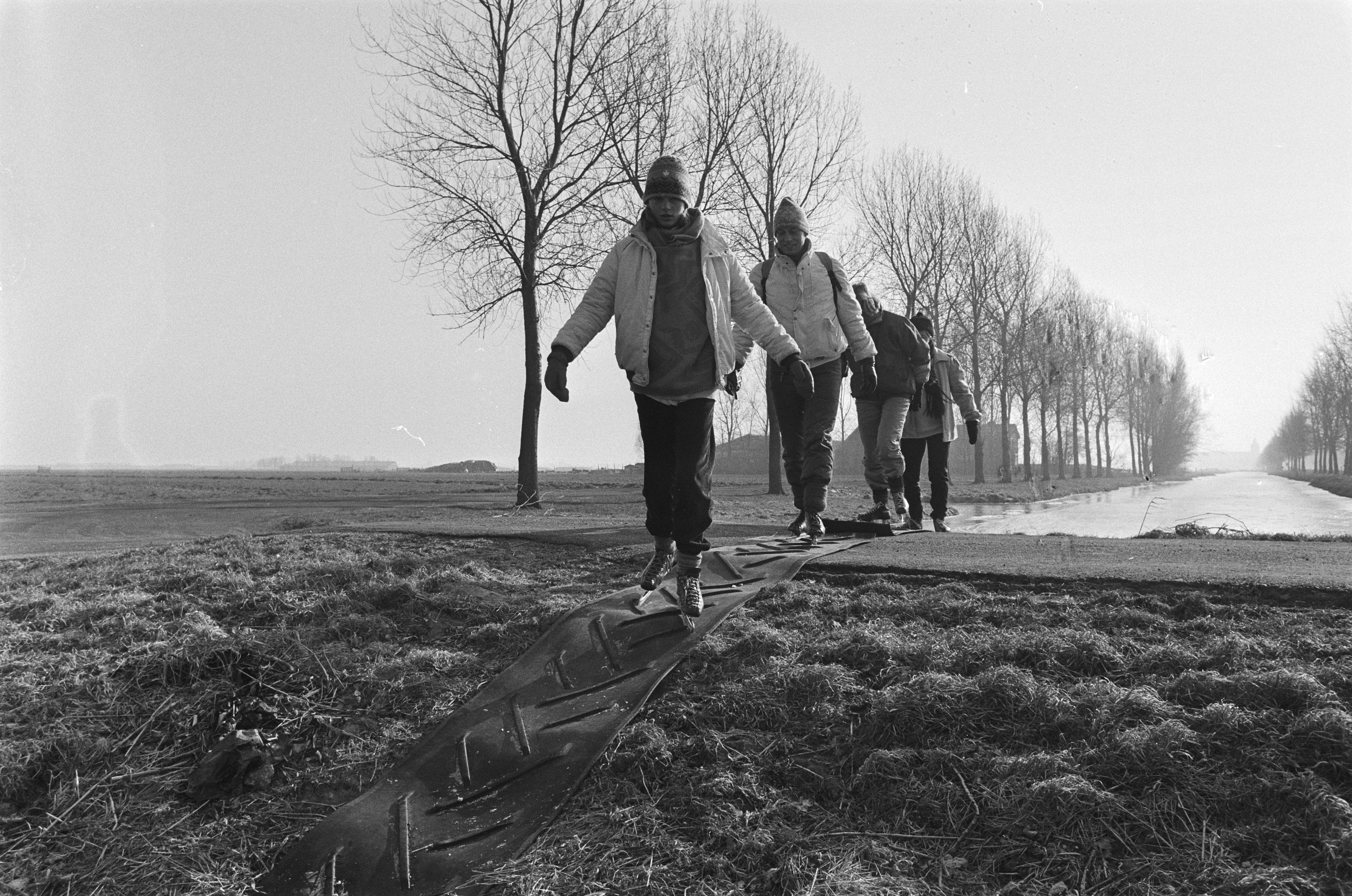 Collectie / Archief : Fotocollectie Anefo Reportage / Serie : Schaatstoertochten Beschrijving : Klunen tijdens tocht in Noord-Holland nabij Edam Datum : 12 februari 1986 Locatie : Edam, Noord-Holland Trefwoorden : kou, schaatsen, winter Fotograaf : Croes, Rob C. / Anefo, [onbekend] Auteursrechthebbende : Nationaal Archief Materiaalsoort : Negatief (zwart/wit) Nummer archiefinventaris : bekijk toegang 2.24.01.05 Bestanddeelnummer : 933-5658